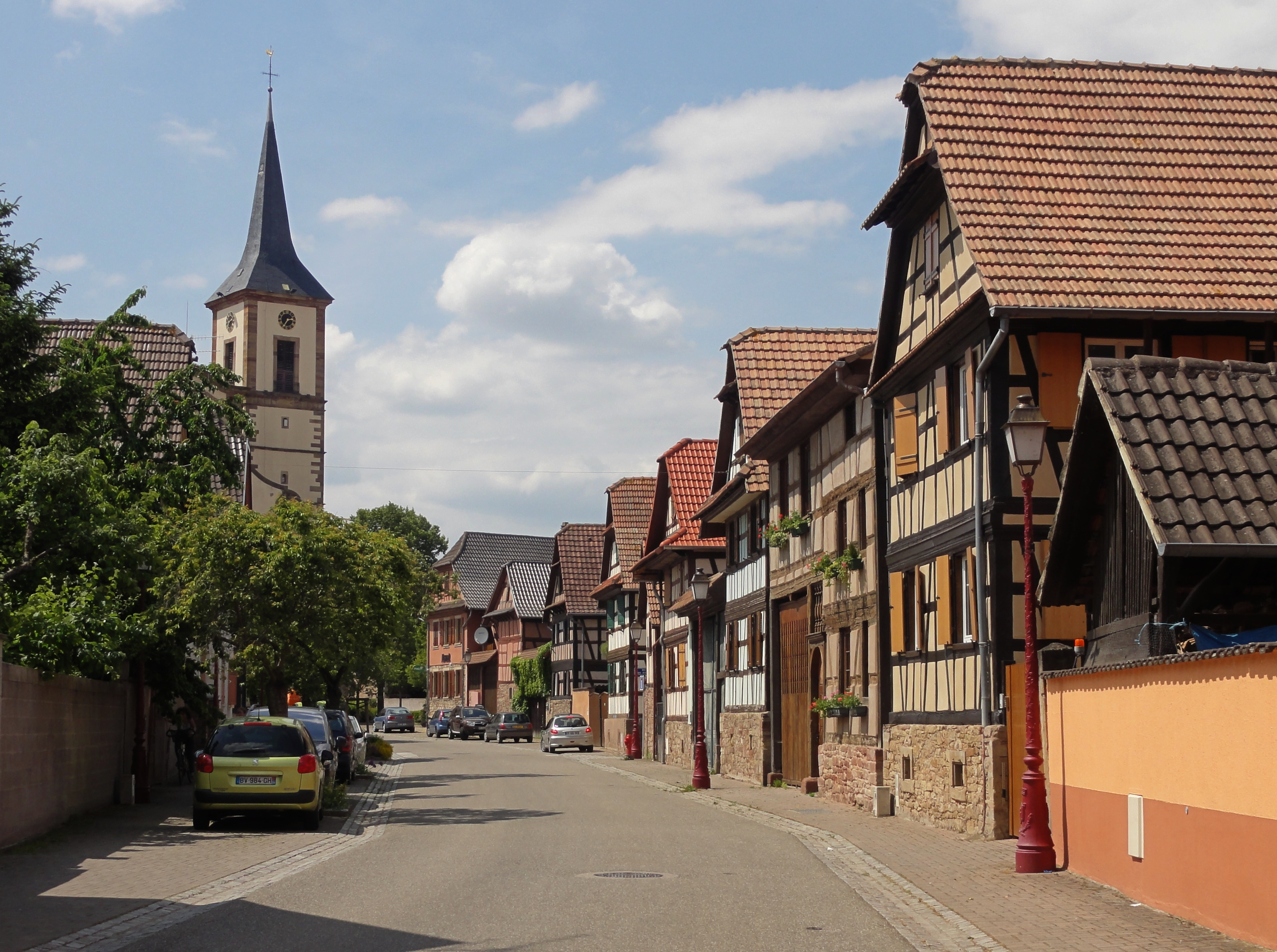 Alsace, Bas-Rhin, Geispolsheim, Rue Sainte-Jeanne-d'Arc.